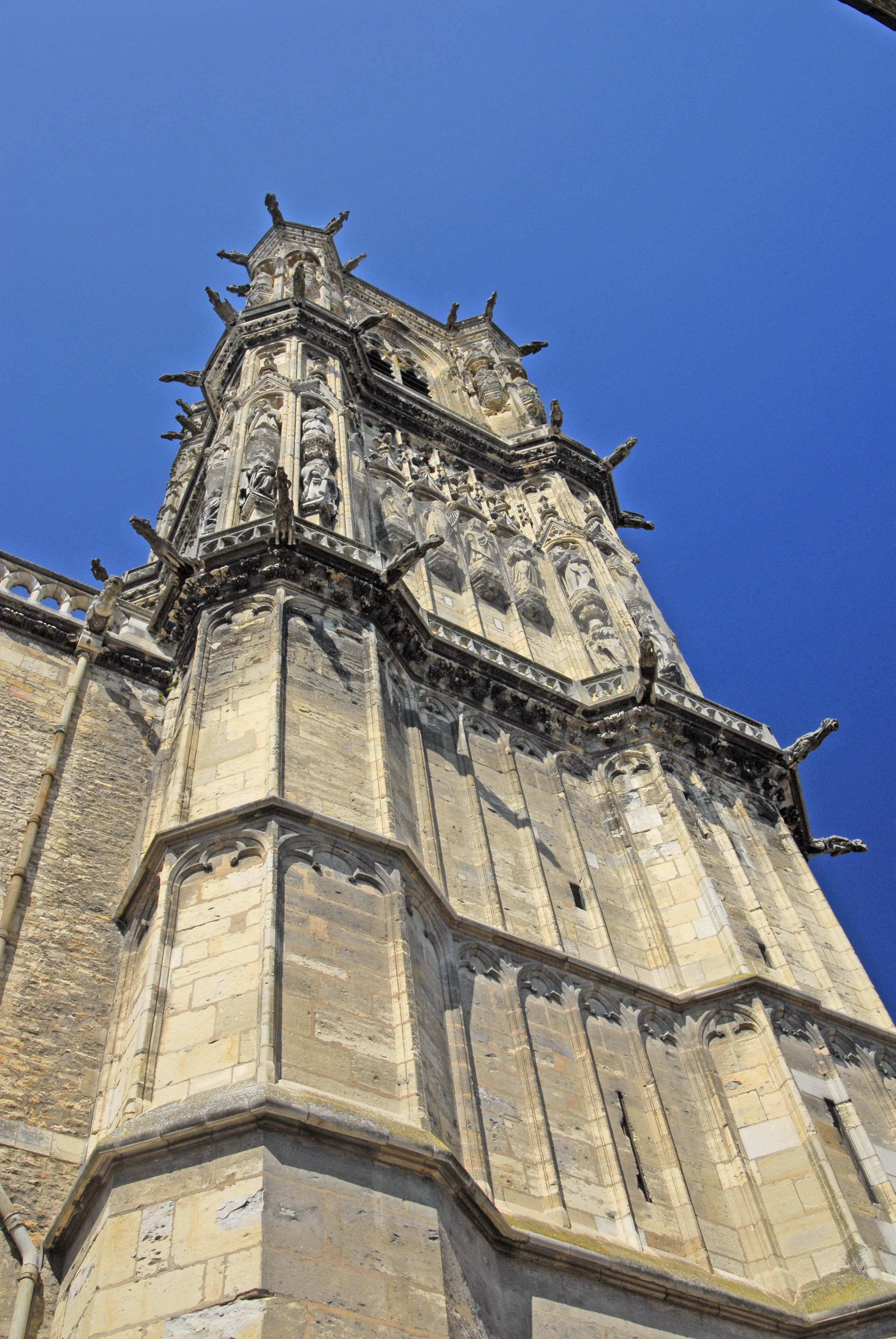 Glockenturm, Südseite